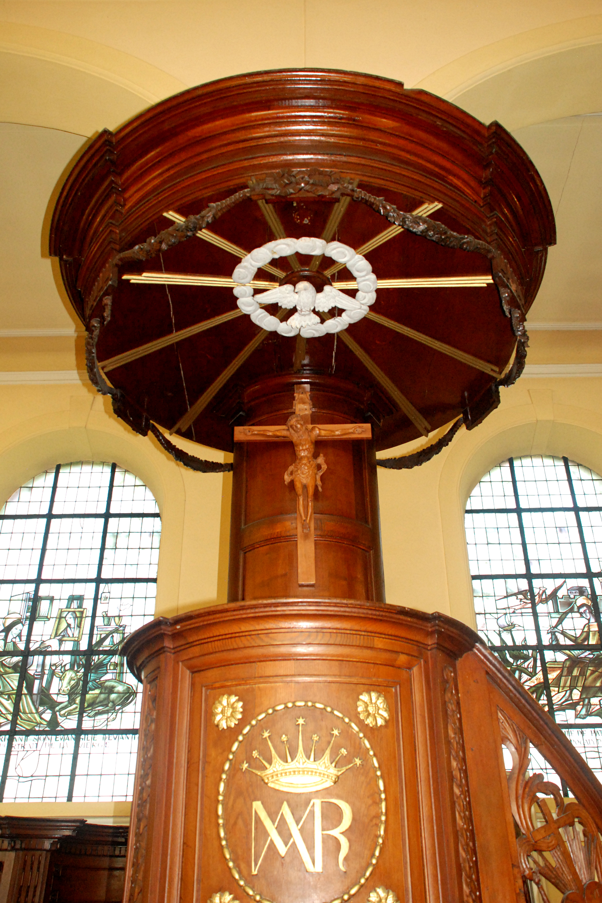 Belgique - Brabant wallon - Mont-Saint-Guibert - Église Saint-Guibert - la chaire de vérité